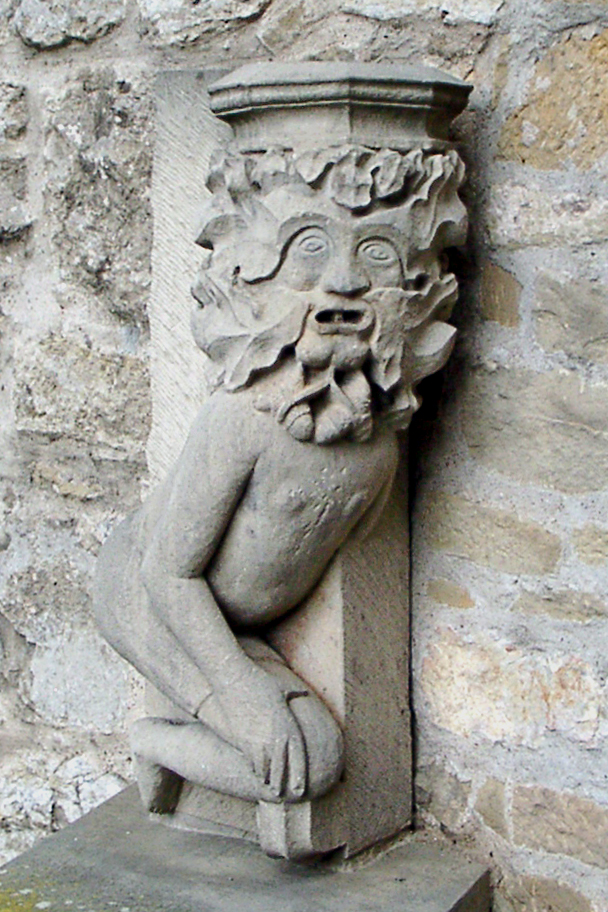 Darstellung des Entenwick oder Klopferle am Schloss Großsachsenheim